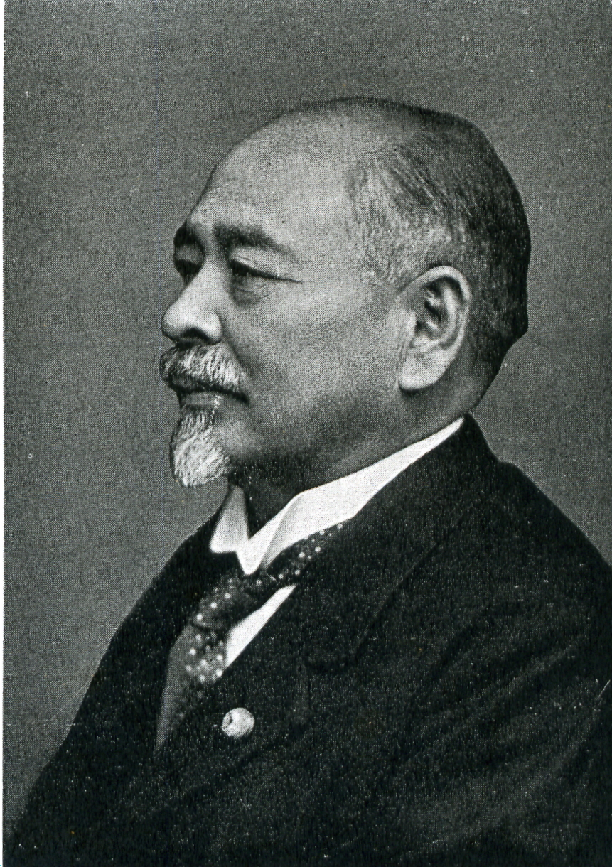 この写真は、菅原傳（1863-1937）の写真です。